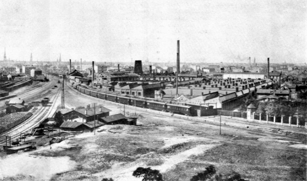 Русско-Балтийский вагонный завод (РБВЗ), Рига 1909